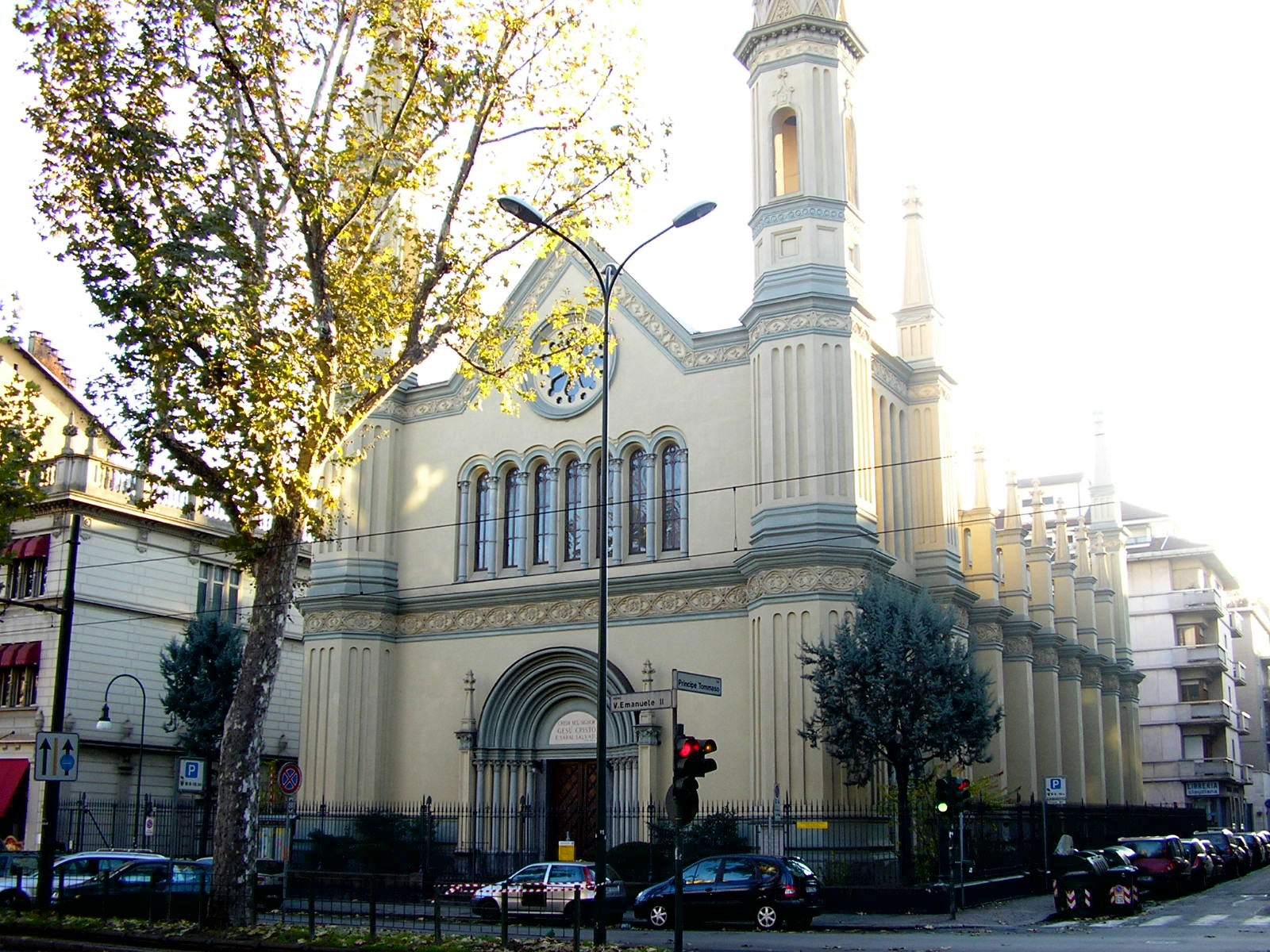 Église évangélique vaudoise de Turin